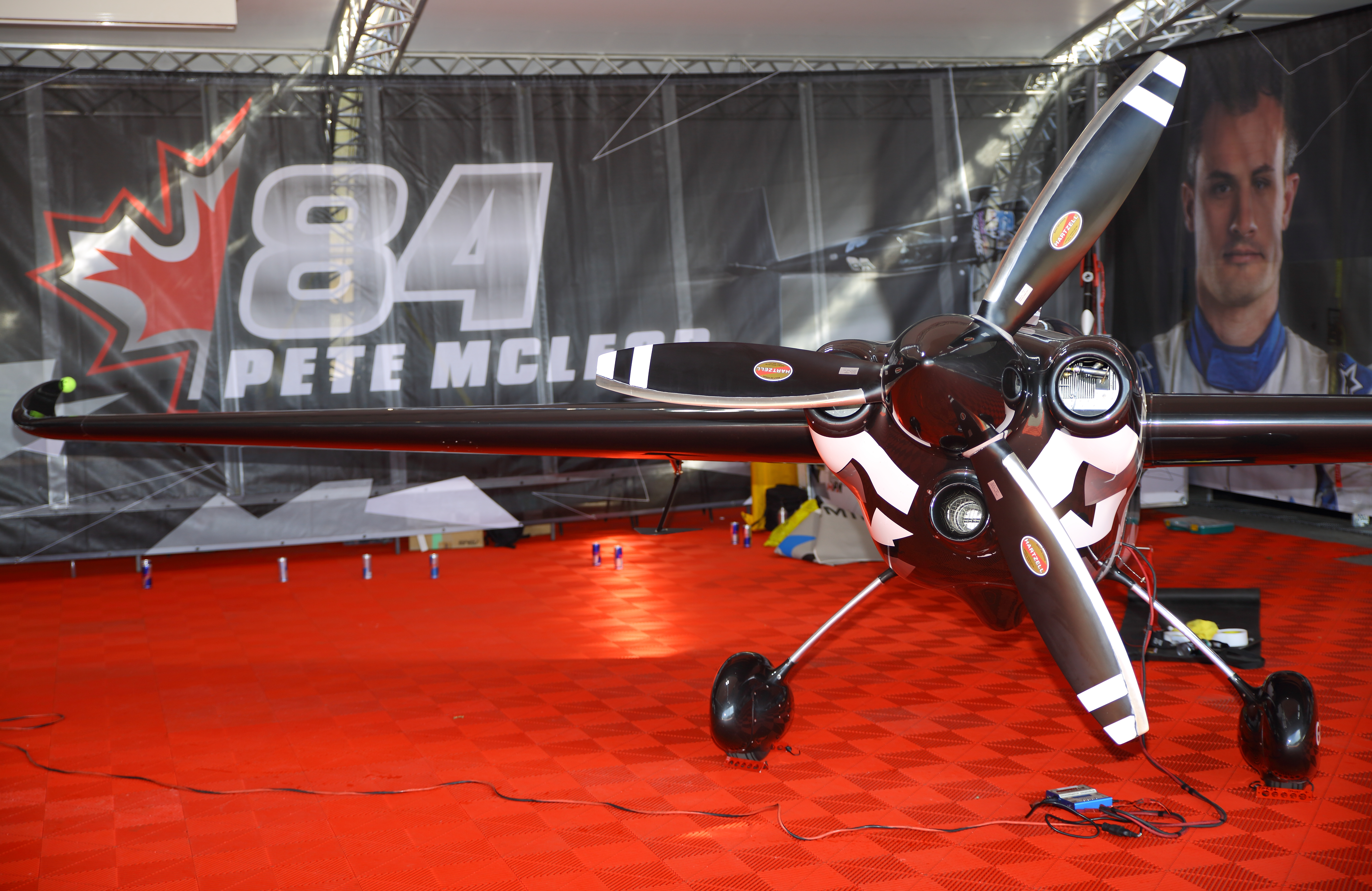 2 y 3 de septiembre, en la ciudad de Oporto